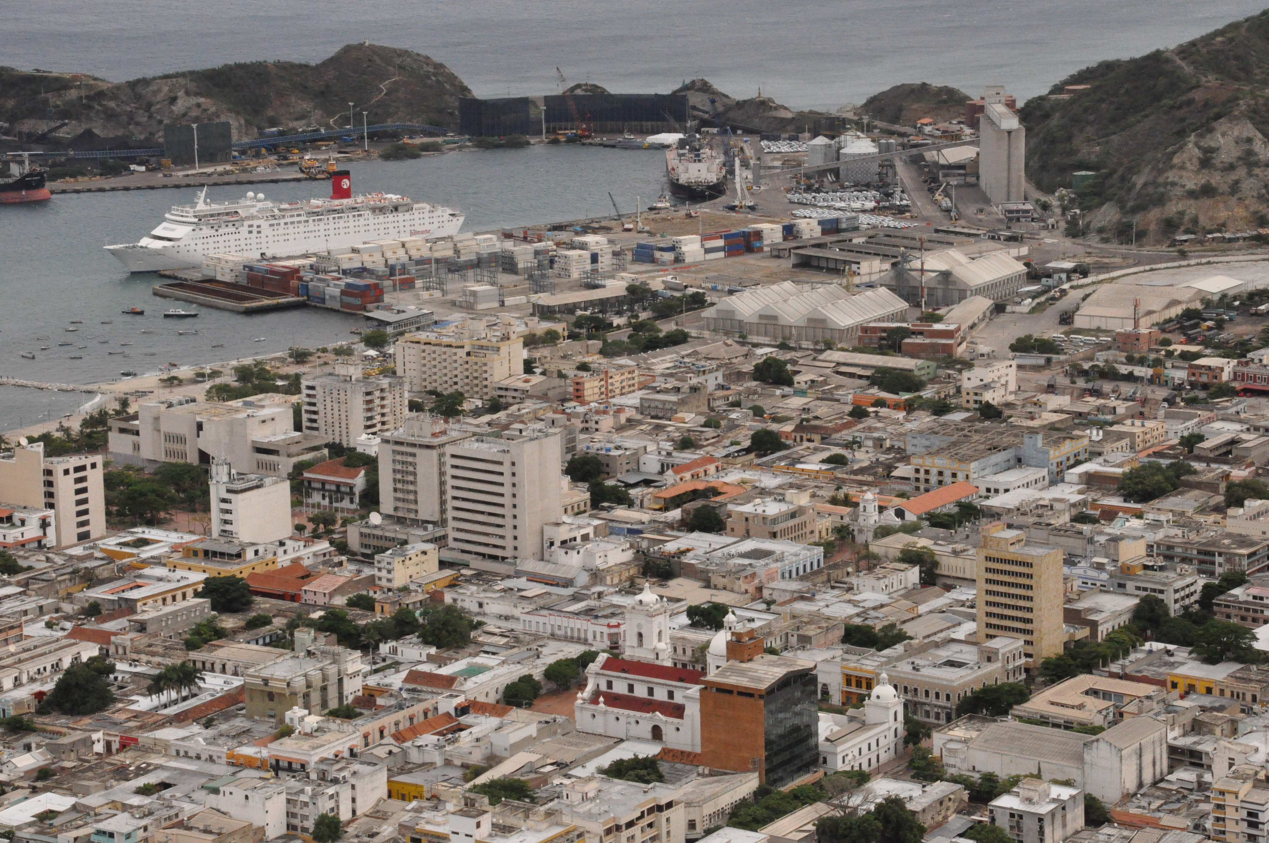 vista panorámica de la ciudad de Santa Marta con su Puerto al costado izquierdo al fondo Esta fotografía fue tomada en el municipio colombiano con código 47001.